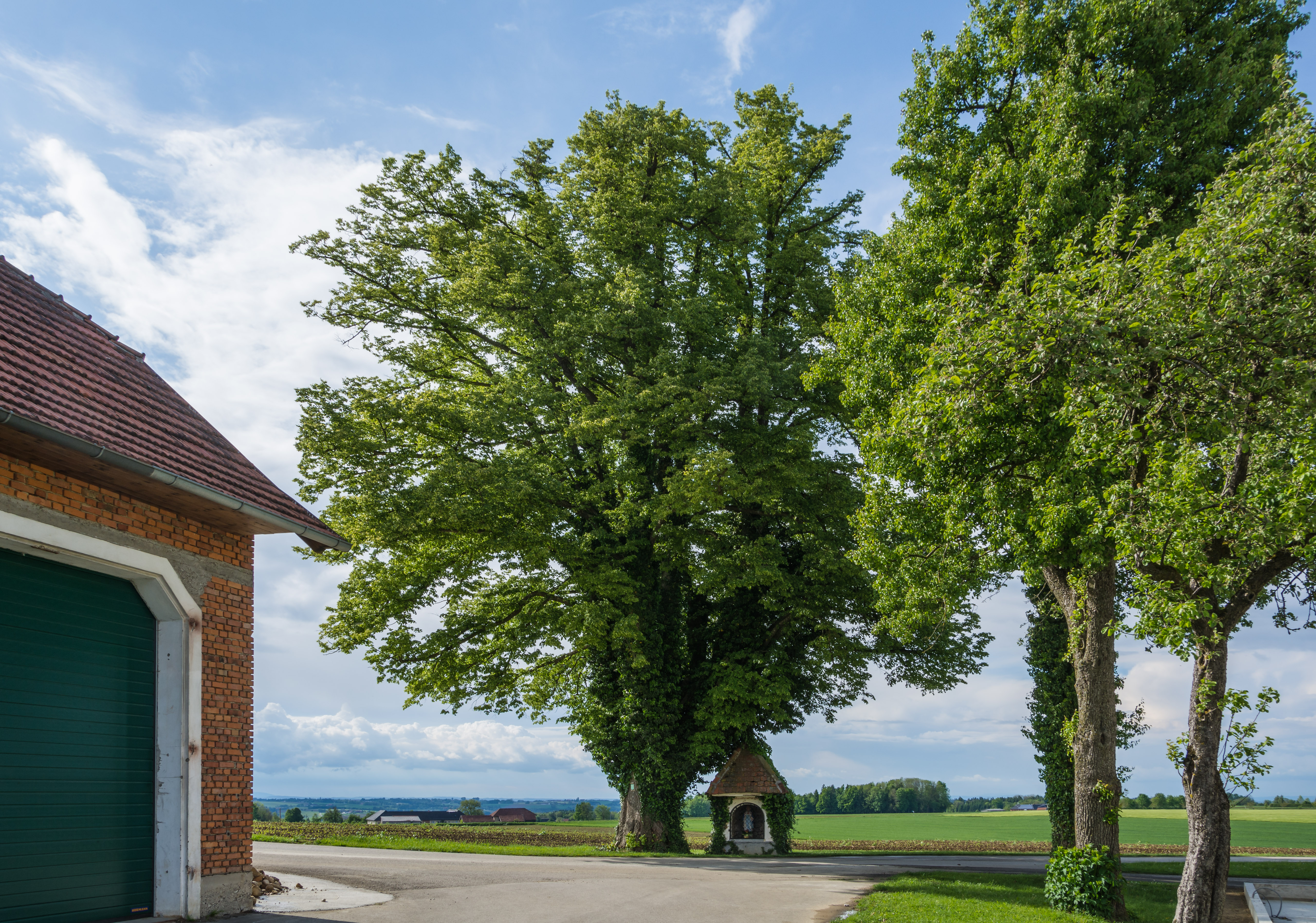 Die vermutlich mehr als 300 Jahre alte Winter-Linde in der Gemeinde Nußbach steht seit 1990 unter Naturschutz. Neben der Linde befindet sich eine kleine Marienkapelle. This media shows the natural monument in Upper Austria with the ID nd407 (Linde in der Gemeinde Nußbach).